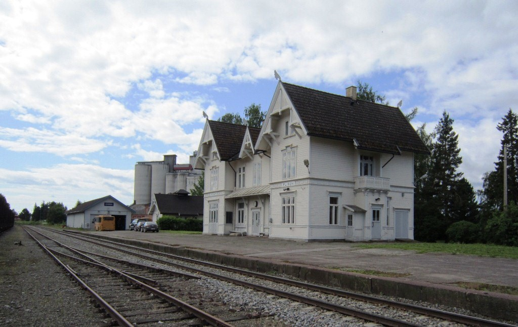 Flisa stasjon på Solørbanen